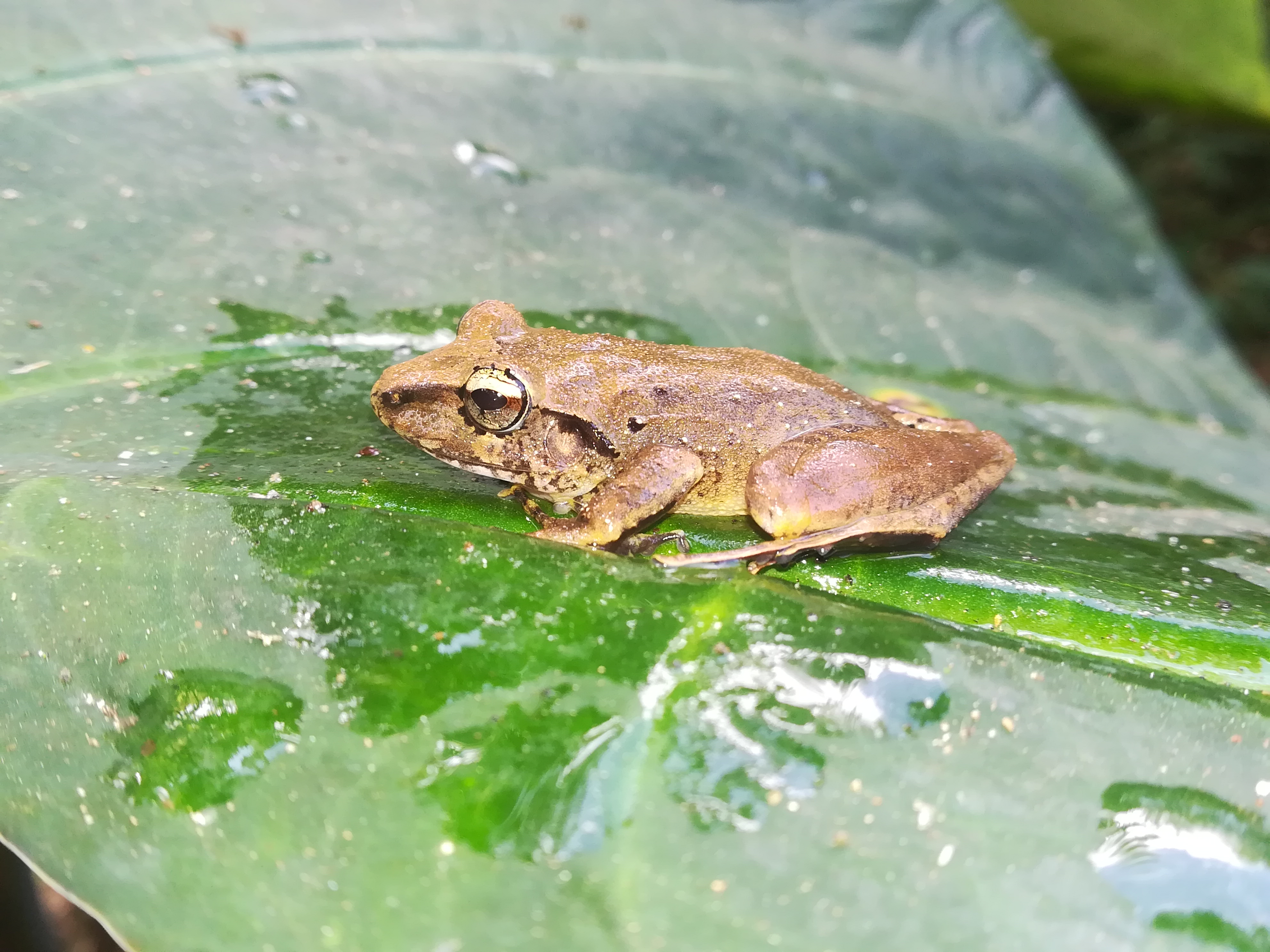 fotografía en la Reserva Forestal El Montuoso